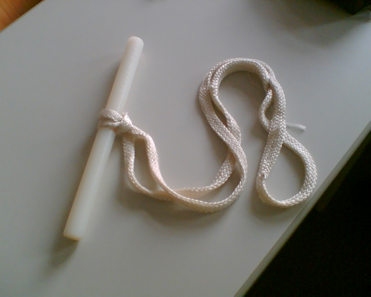 Zughilfe, die bei der Rindergeburt um den Kopf des Kalbes gelegt werden kann